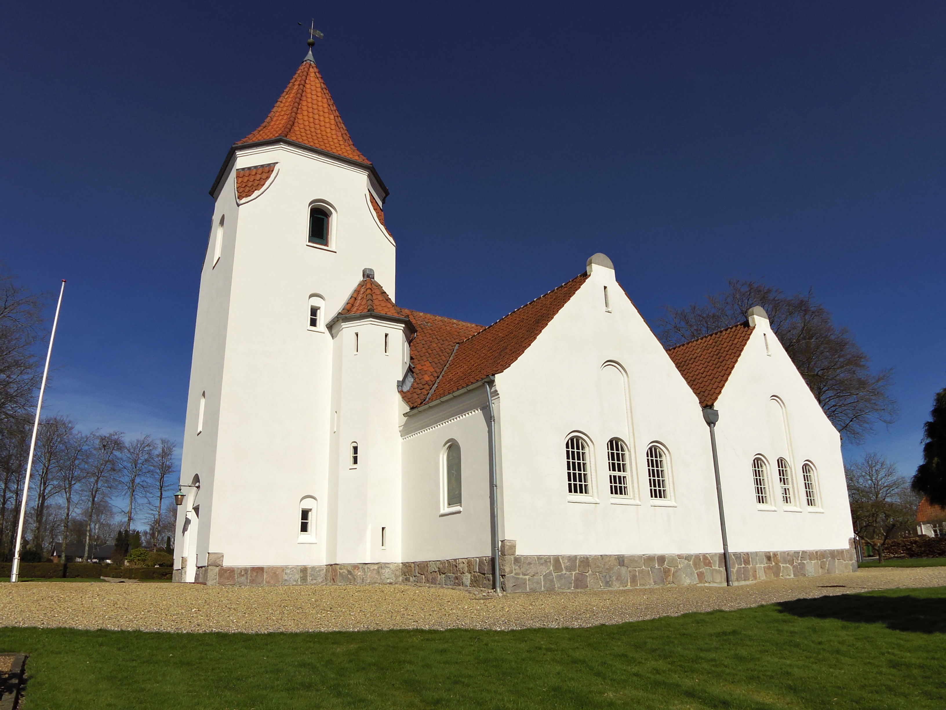 Frimenighedskirken set fra sydvest